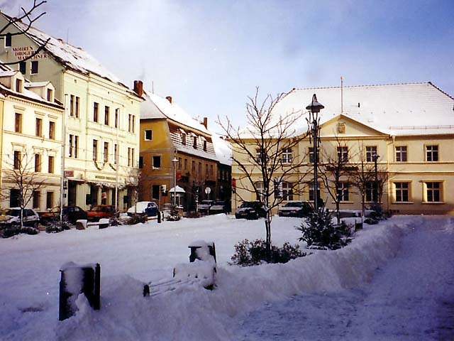 Ostseite des Martkes in Reichenbach/O.L.